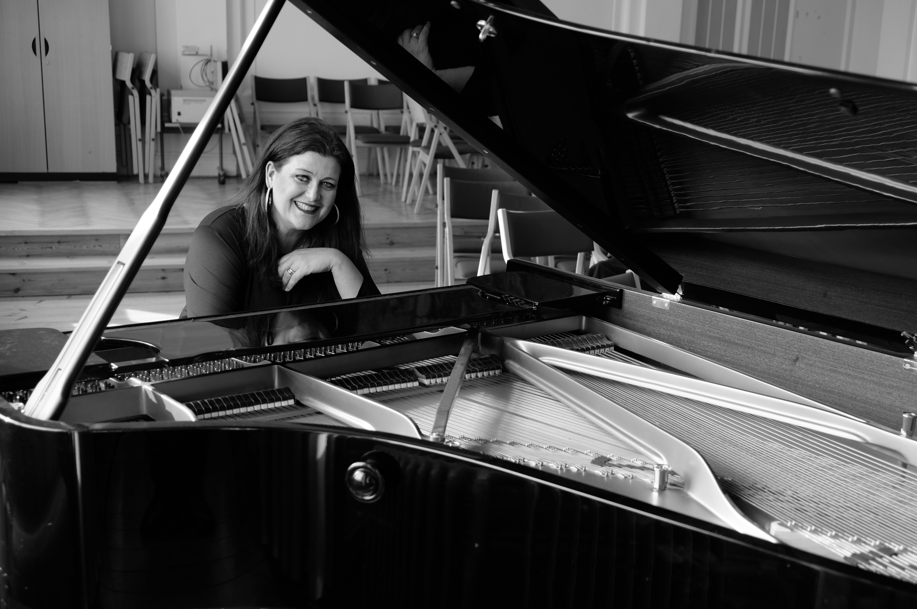 Jazz pianist/ composer and singer from Sweden